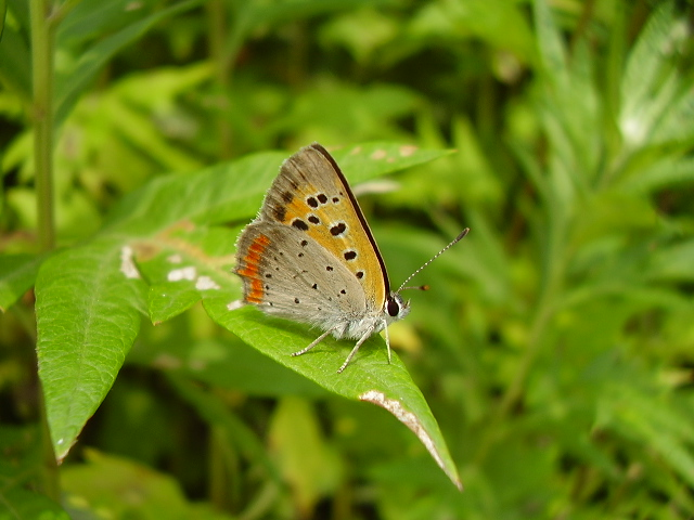 ベニシジミ (Japanese name : Benishijimi) Lycaena phlaeas